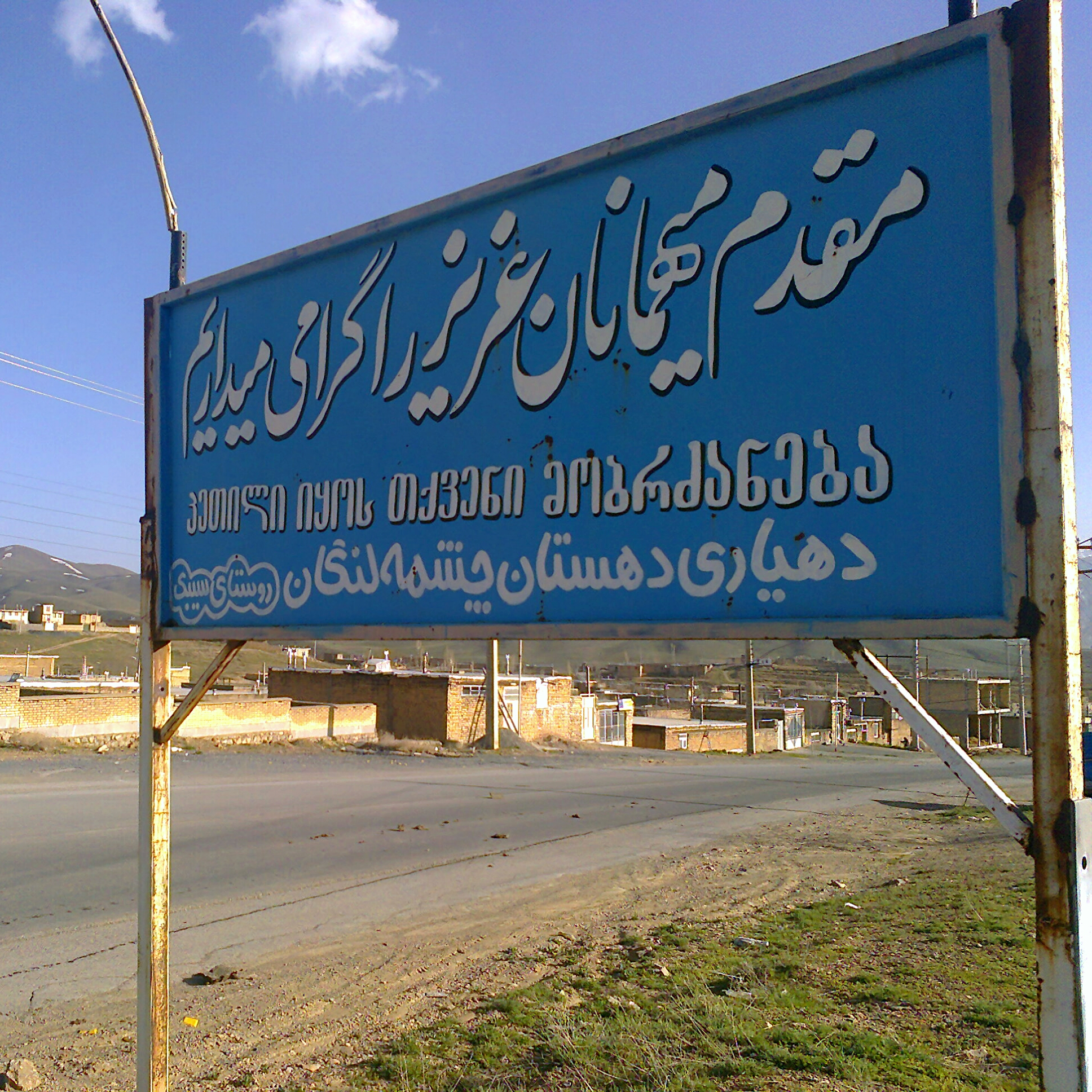 سیبک، روستایی از توابع بخش مرکزی شهرستان فریدون‌شهر در استان اصفهان ایران است.